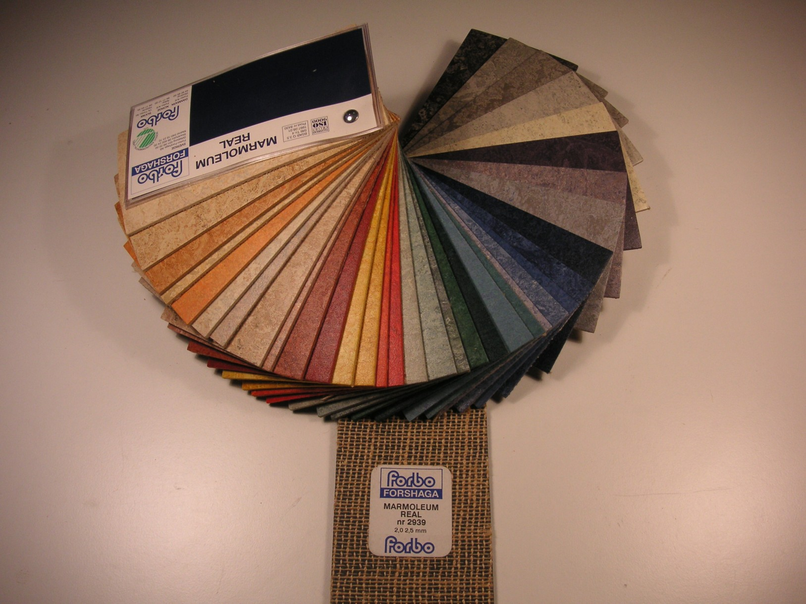 Linoleum